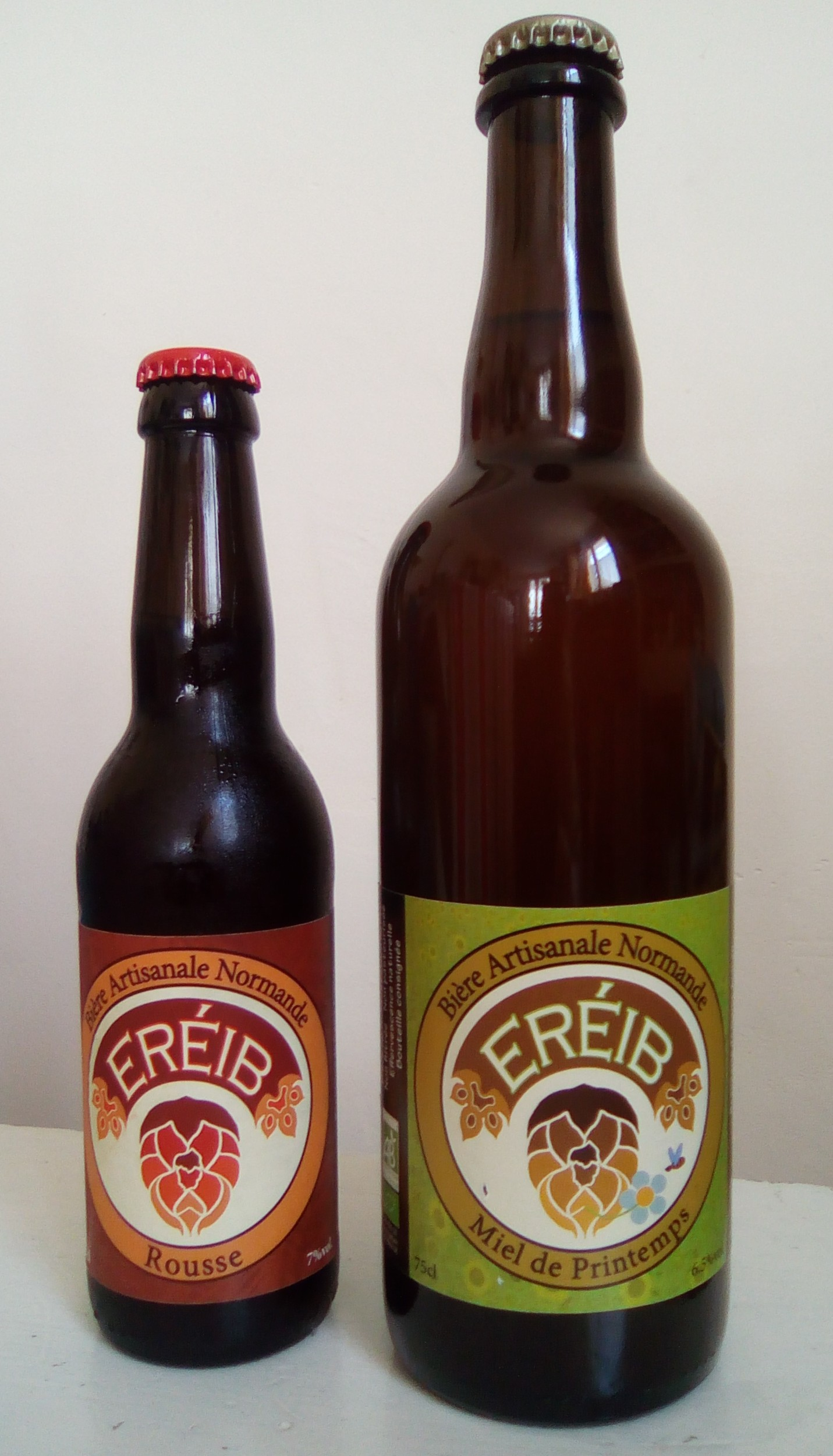 Bouteilles de la bière normande "Eréib" (rousse et miel)